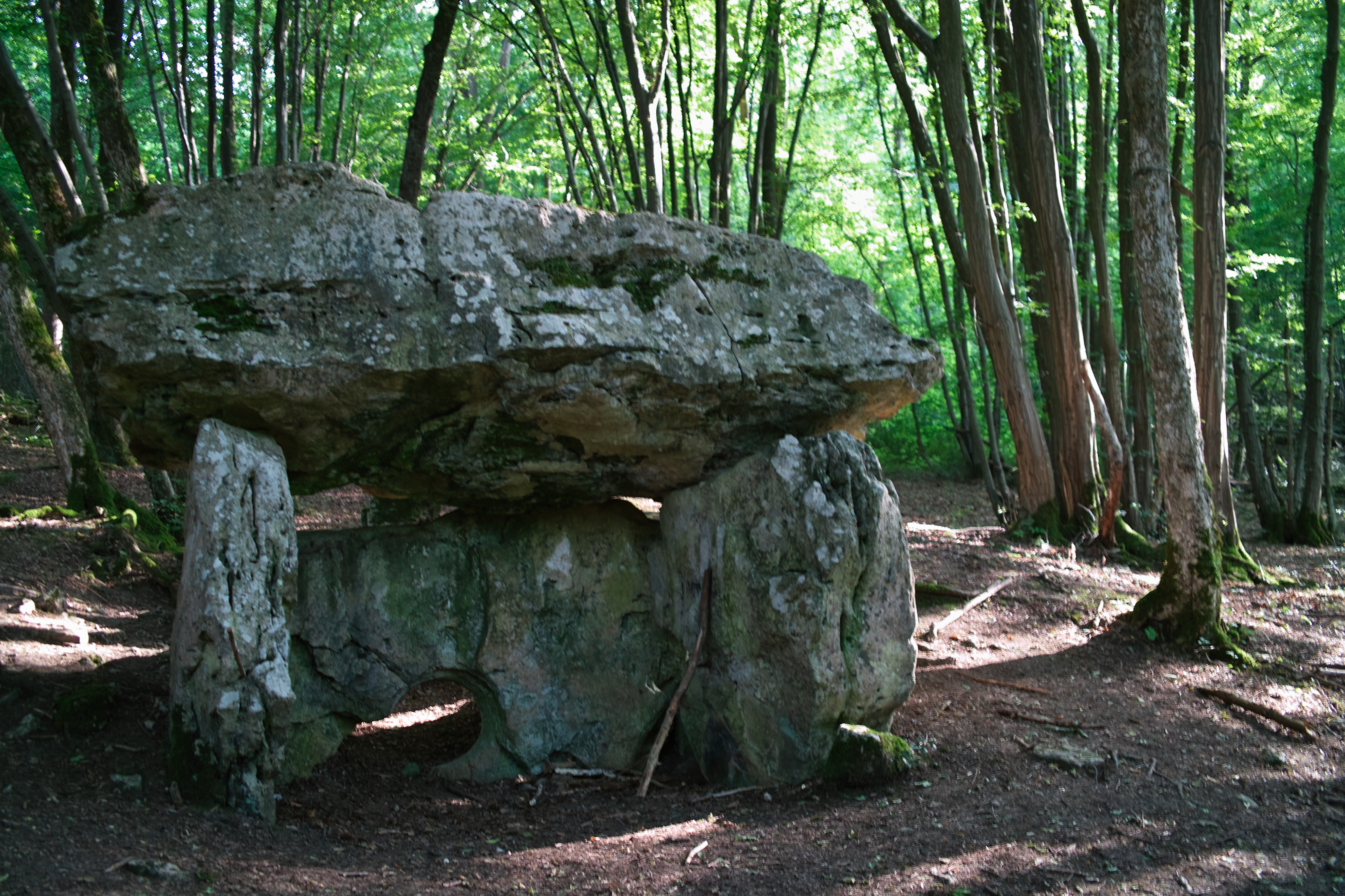 Trie-Château Oise: Dolmen des Trois Pierres, à La Garenne (classé monument historique par liste de 1862)